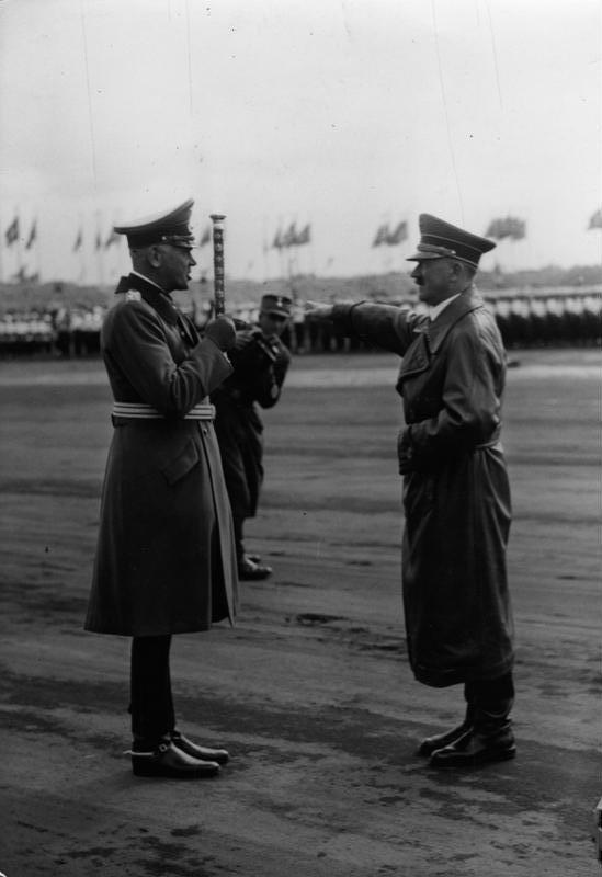 Nürnberg, Reichsparteitag, von Blomberg, Hitler Scherl: Reichsparteitag in Nürnberg, Tag der Wehrmacht; Der Führer nimmt die Meldung des Reichskriegsministers, Generalfeldmarschall von Blomberg entgegen. 11849-37 ADN-ZB/ Archiv Im faschistischen Deutschland 1933-45: Der 9. Reichsparteitag der NSDAP vom 6.-13.September 1937 in Nürnberg wurde mit den Vorführungen der Wehrmacht auf dem Zeppelinfeld am "Tag der Wehrmacht" beendet. Der Reichskriegsminister, Generalfeldmarschall Werner von Blomberg meldet Adolf Hitler (r.) die angetretenen Truppenverbände. 11849-37 Abgebildete Personen: Hitler, Adolf: Reichskanzler, Deutschland Blomberg, Werner von: Generalfeldmarschall, Heer, Deutschland